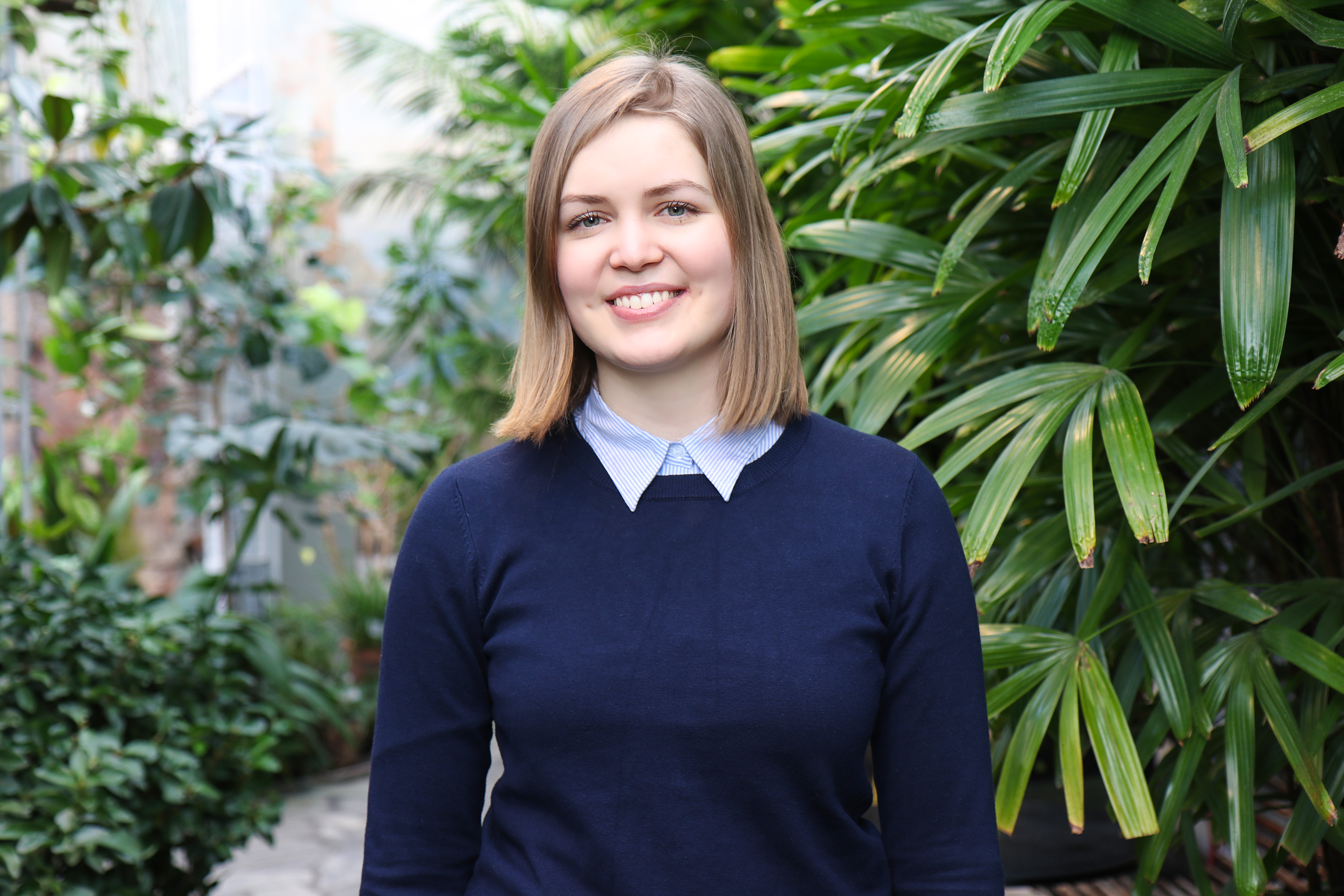 Suvi Mäkeläinen on toiminut Suomen suurimman poliittisen nuorisojärjestön Keskustanuorten puheenjohtajana vuodesta 2017.